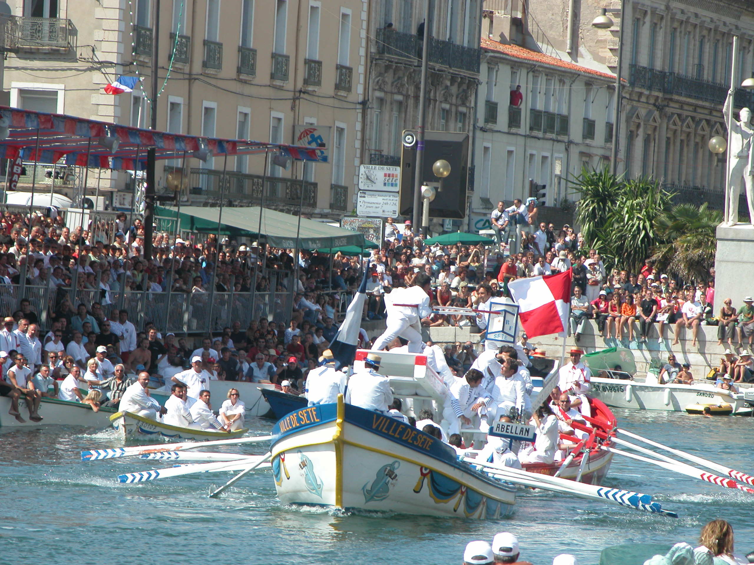 Joutes de la Saint Louis 2005 à Sète - Photo personnelle.